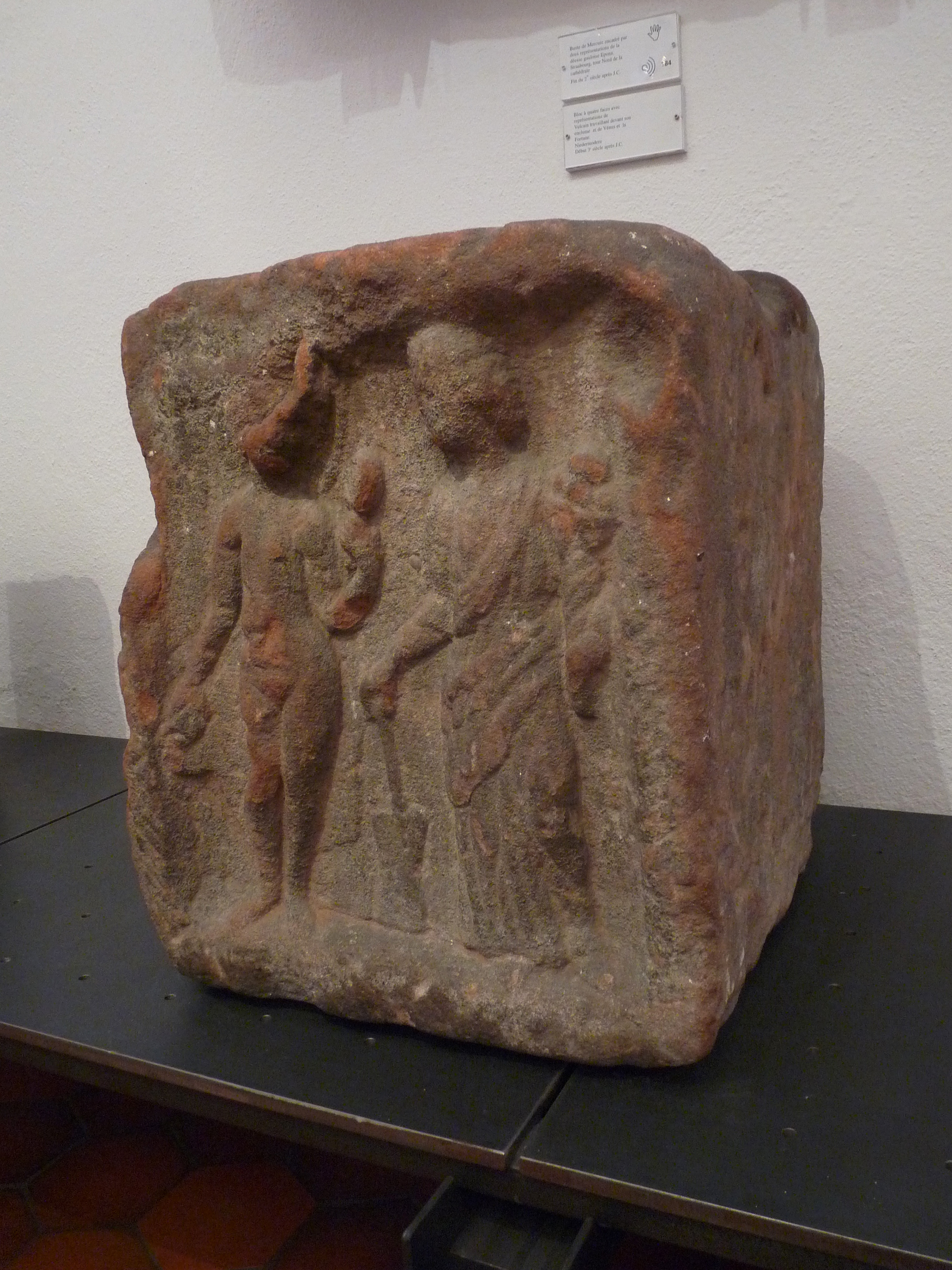 Bloc à quatre faces représentant Vulcain travaillant devant son enclume et de Vénus et la Fortune. Début du 3e siècle après JC. Trouvé à Niedermodern. Musée archéologique de Strasbourg